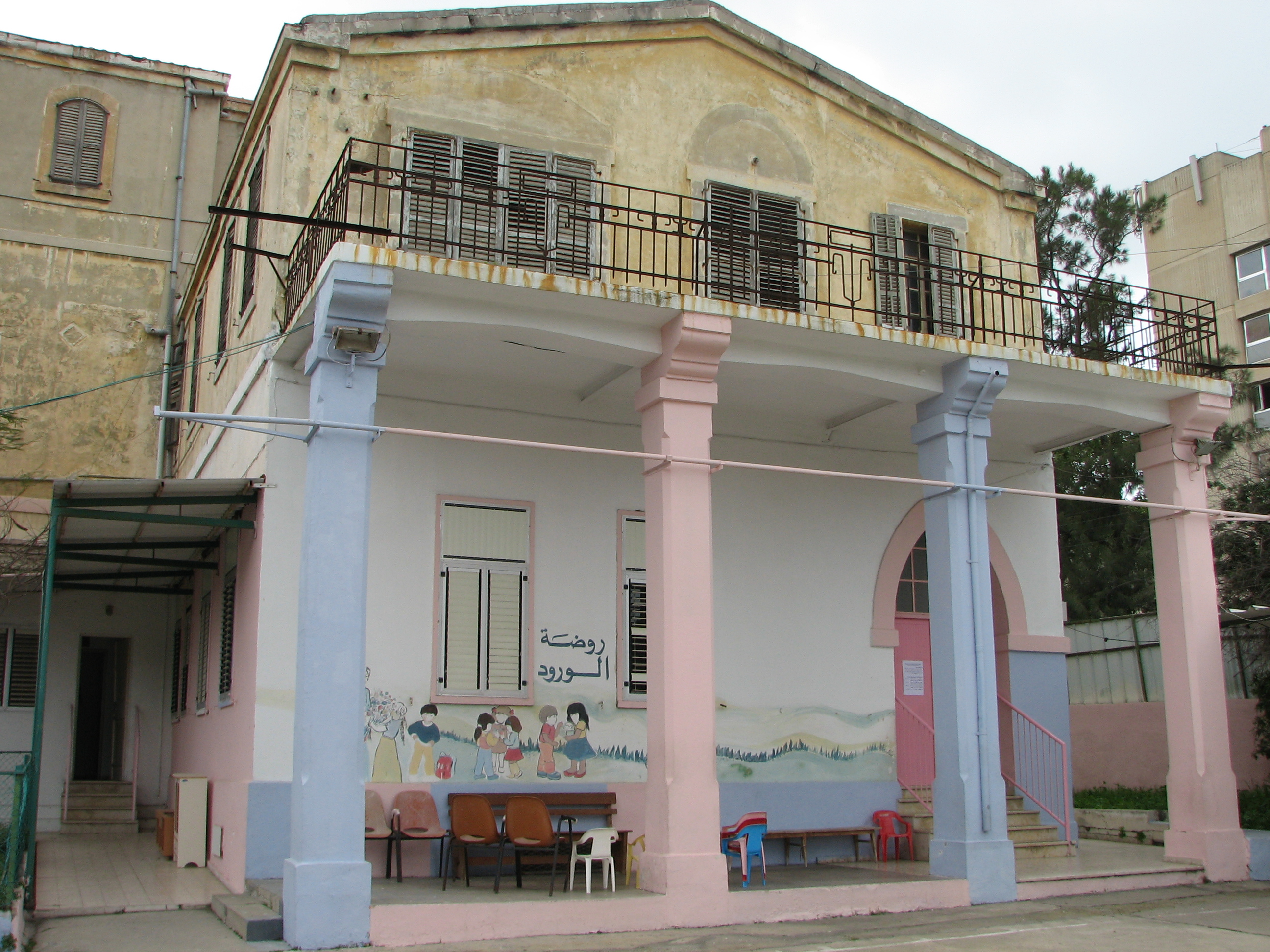 Hardegg Institute, German Colony of Haifa , Israel מכון הרדג בשכונה הגרמנית בחיפה. שימש בתחילה בית ספר חקלאי, לאחר מכן בית ספר לתיירות, בית חולים, כיום משמש כגן ילדים המופעל על ידי נזירות חזית המבנה של גן הילדים הפועל במבנה. . החזית הצפונית